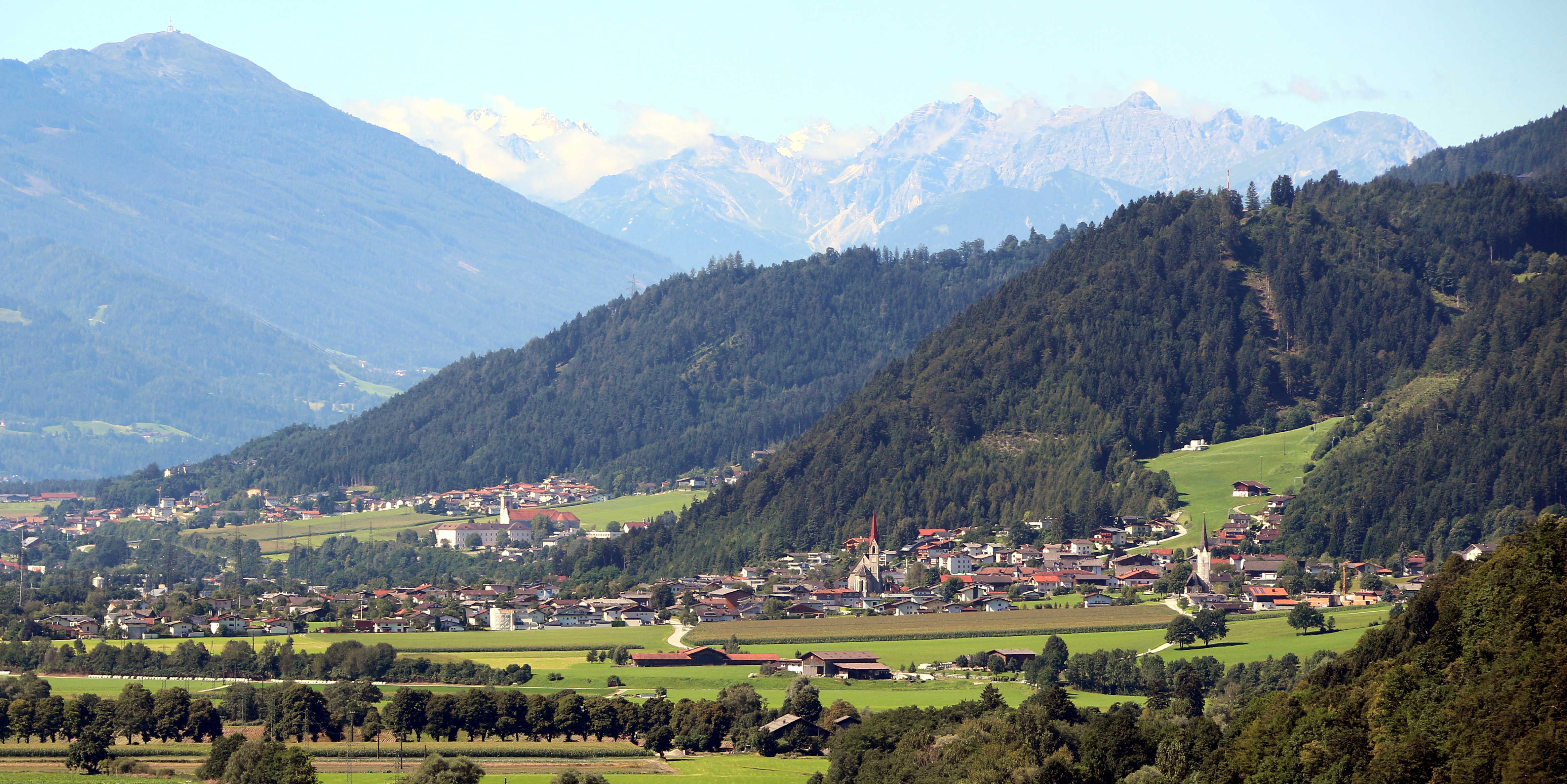 Stans gesehen von Nordosten (Jenbach).